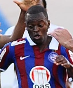 2012-09-02_Campeonato Brasileiro 2012_Série A_Bahia 1 x 0 São Paulo_Estádio Roberto Santos_PItuaçu